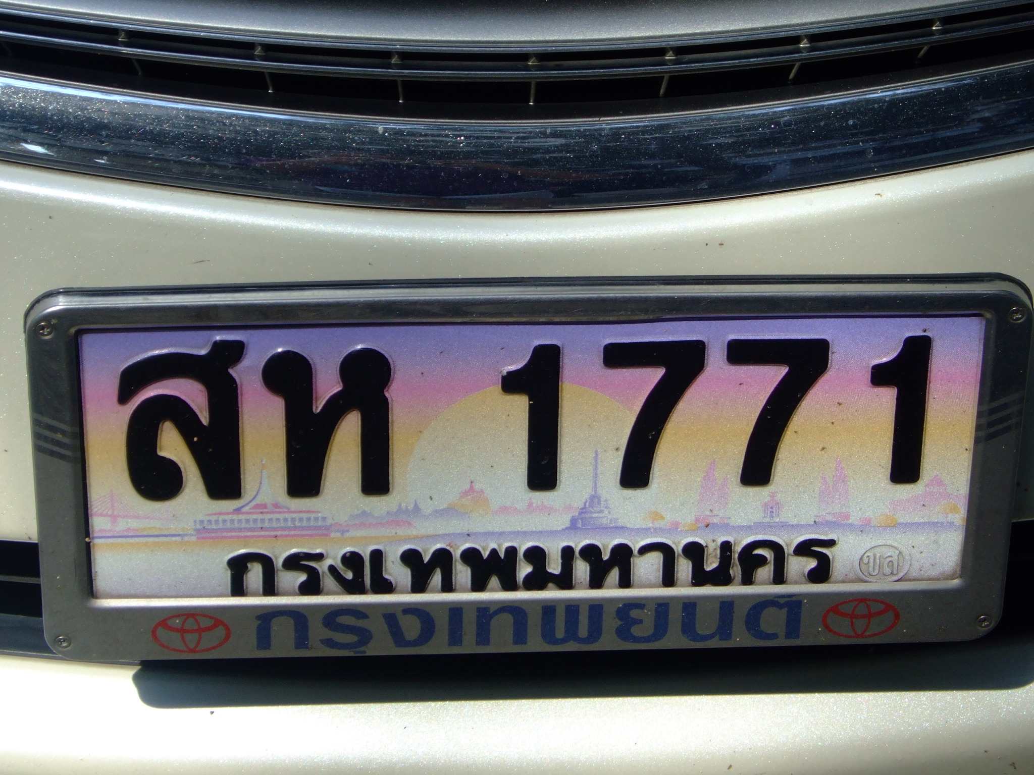 Foto propria - novembre 2009